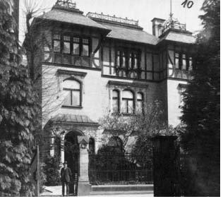 Villa Barthels (heute Adam-Stegerwald-Haus), Hauptstraße 489, Königswinter